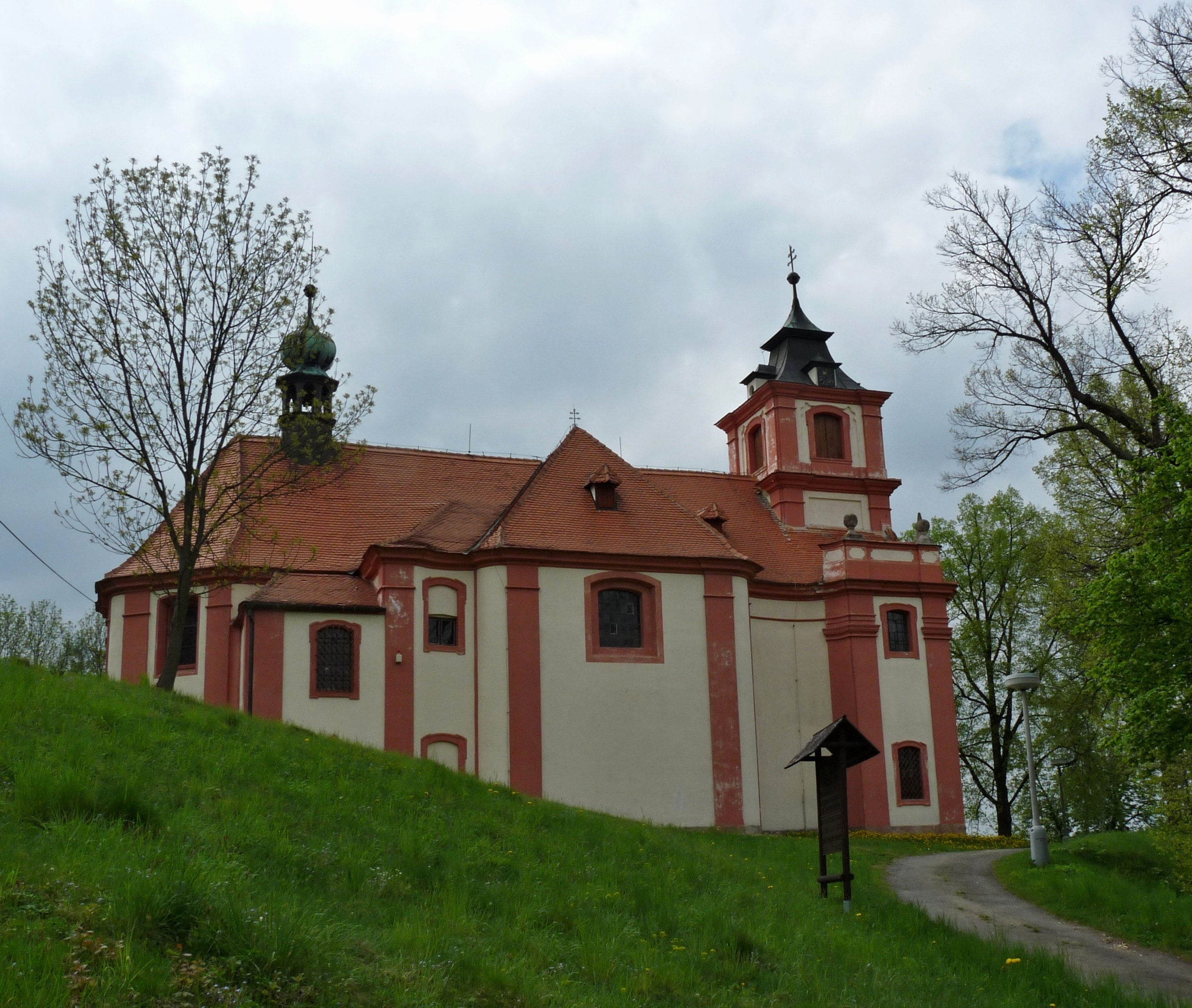 Kostel Navštívení P. Marie v Petrovicích